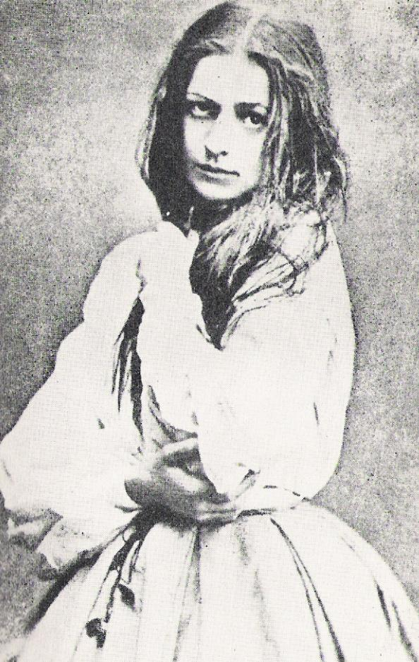 Helena Modrzejewska w roli Praksedy z dramatu Józefa Korzeniowskiego